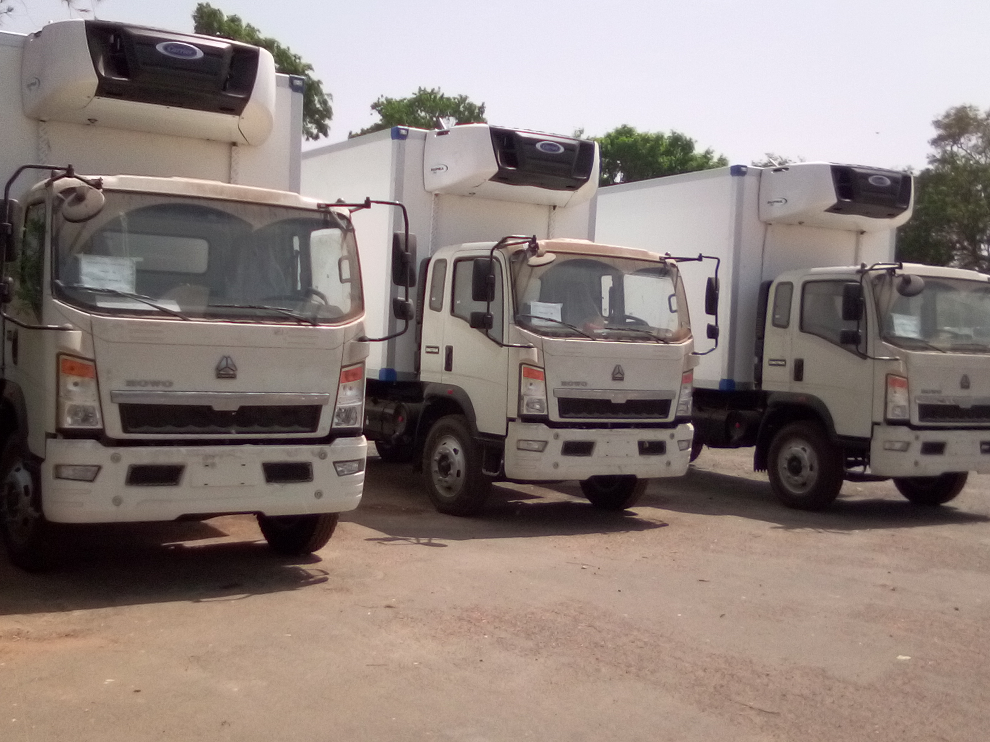 Camions frigorifiques déja finis d'être montés à Sen bus de Thiès This is an image with the theme "Africa on the Move or Transport" from: Senegal